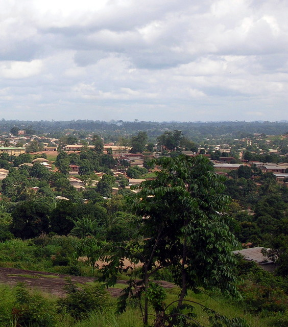 Nzerekore, Guinea